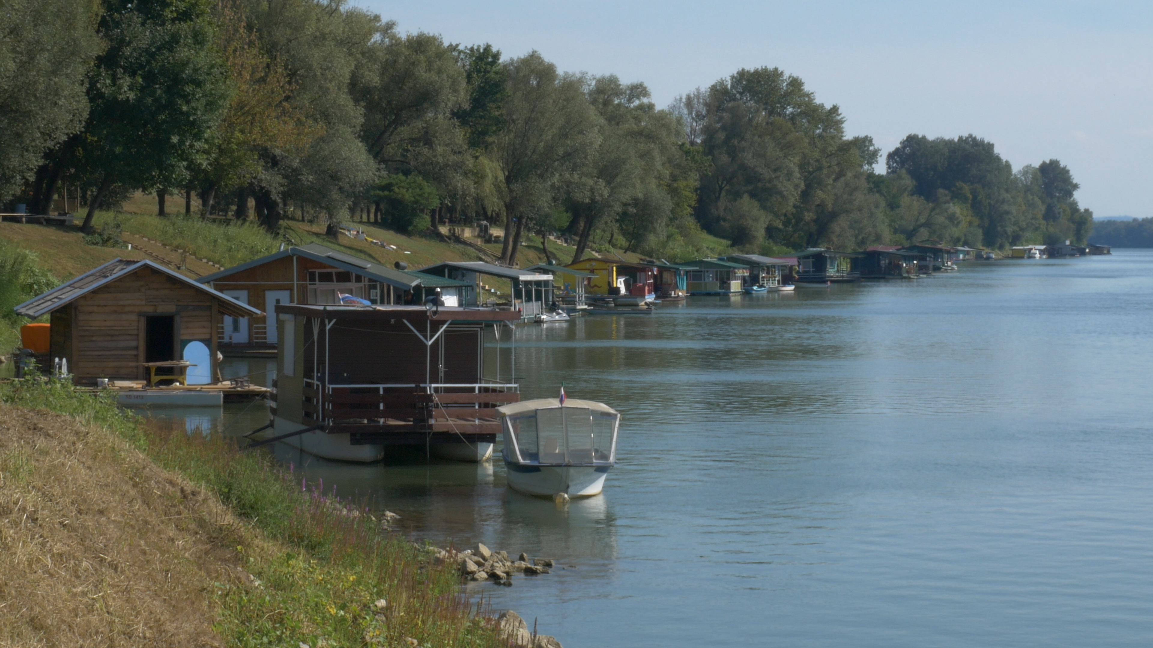 Splavarska ulica u Slavonskom Brodu